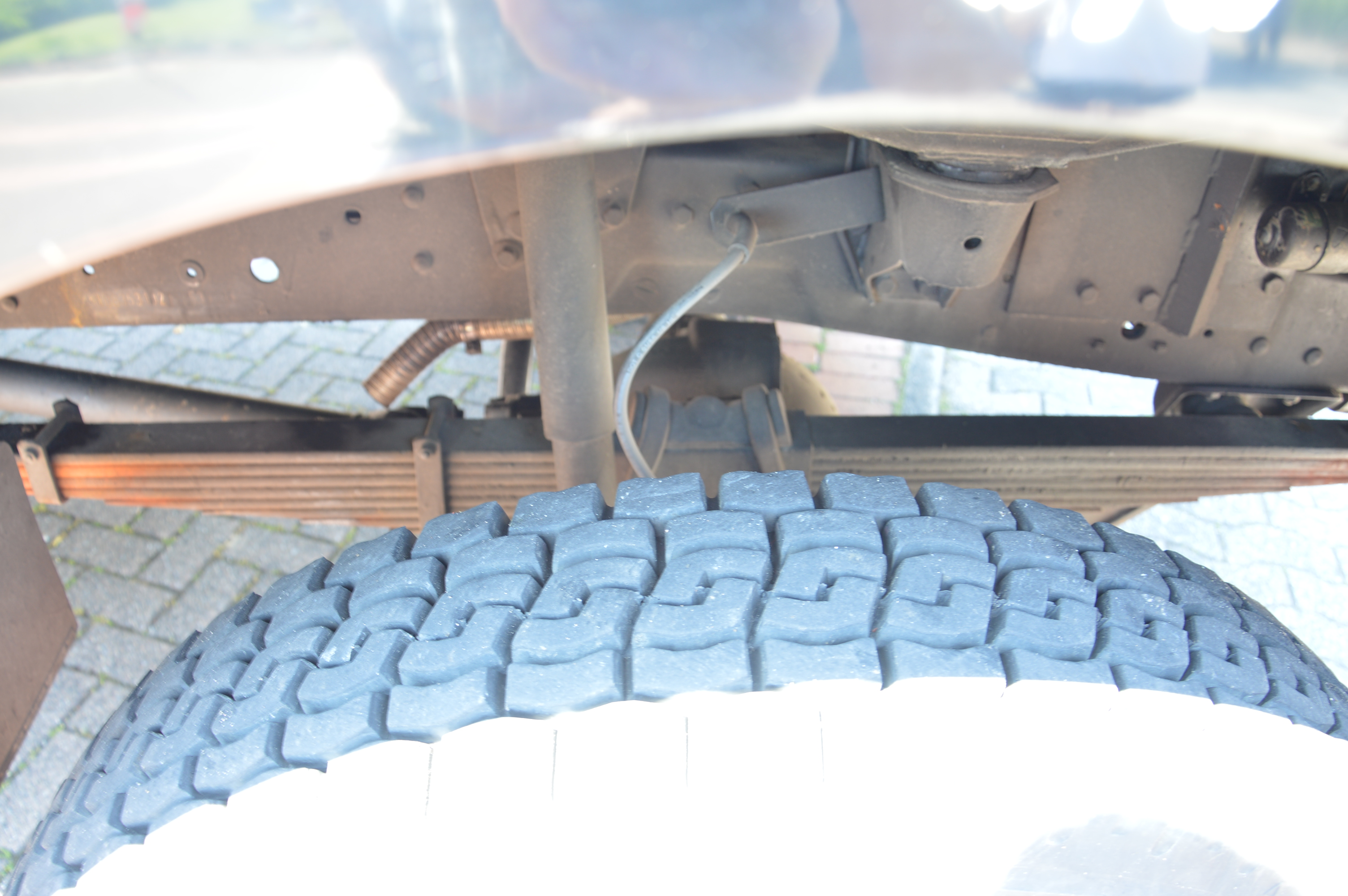 Blattfeder der Vorderachse eines Mercedes-Benz LA 911